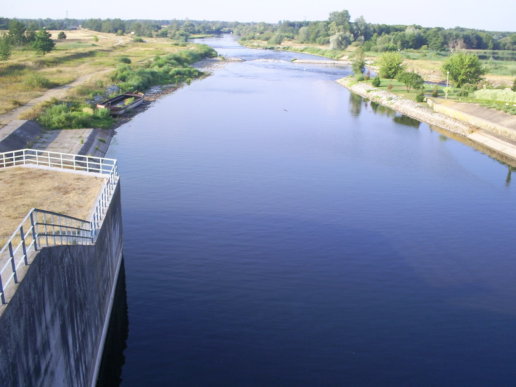 Река варта, на излазу из језера Језиорско - поглед са бране. (Пољска) 25.07.2006. Author:Jovan Vuković If you need this picture with biger rezolution ask me there.